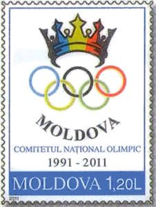 Почтовая марка Республики Молдова, посвященная 20-летию НОК Молдовы